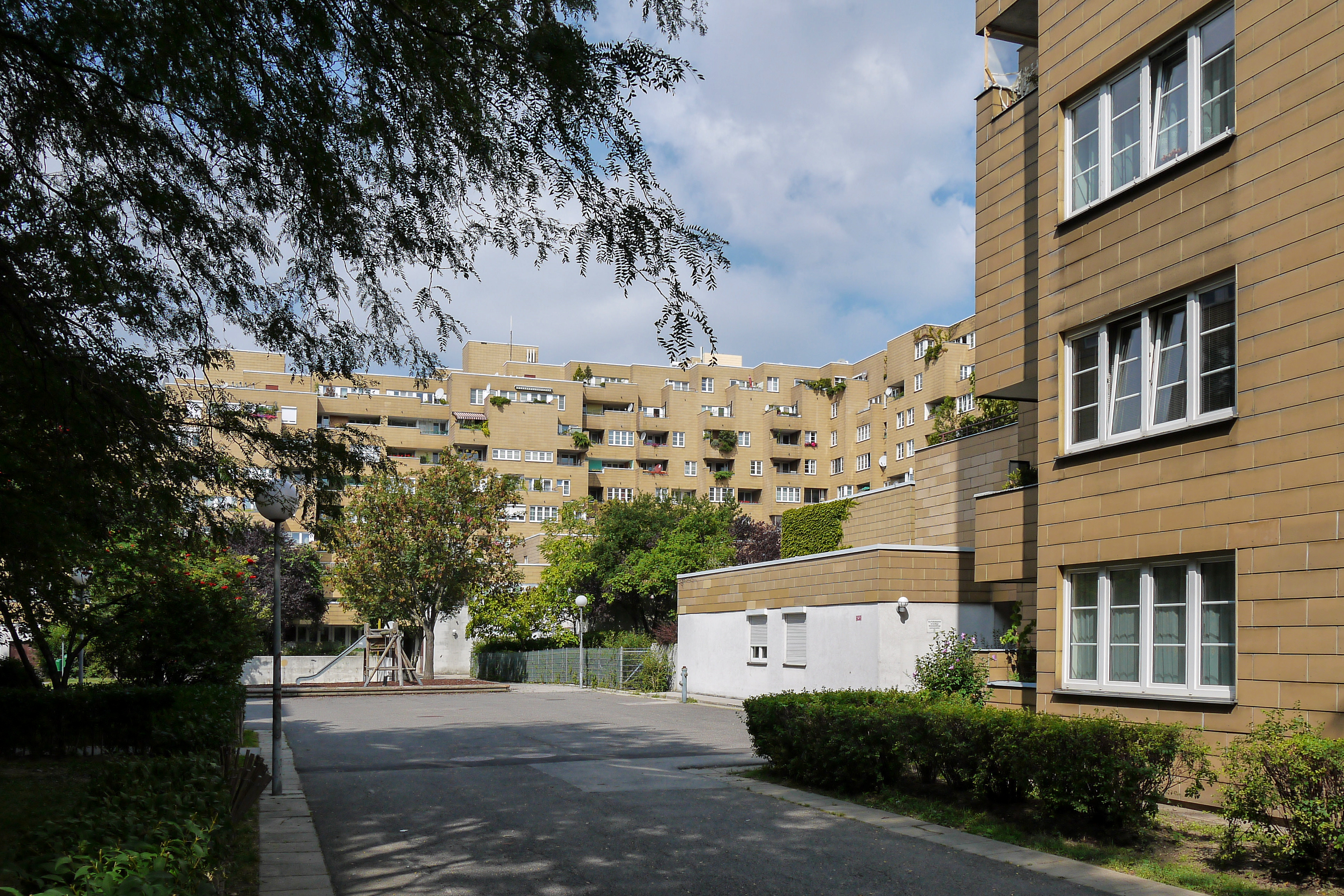 Karl-Wrba-Hof